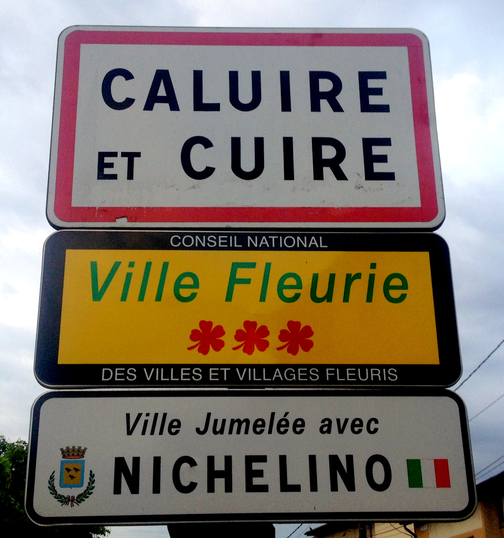 Panneau d'entrée dans Caluire-et-Cuire.